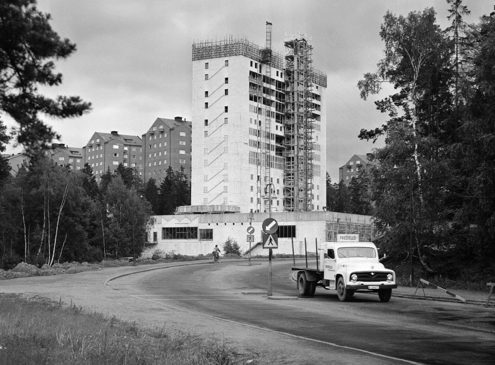 Björkhagens höghus "Duggregnet 5"